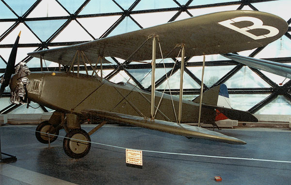 Физир ФН у Музеју ваздухопловства.